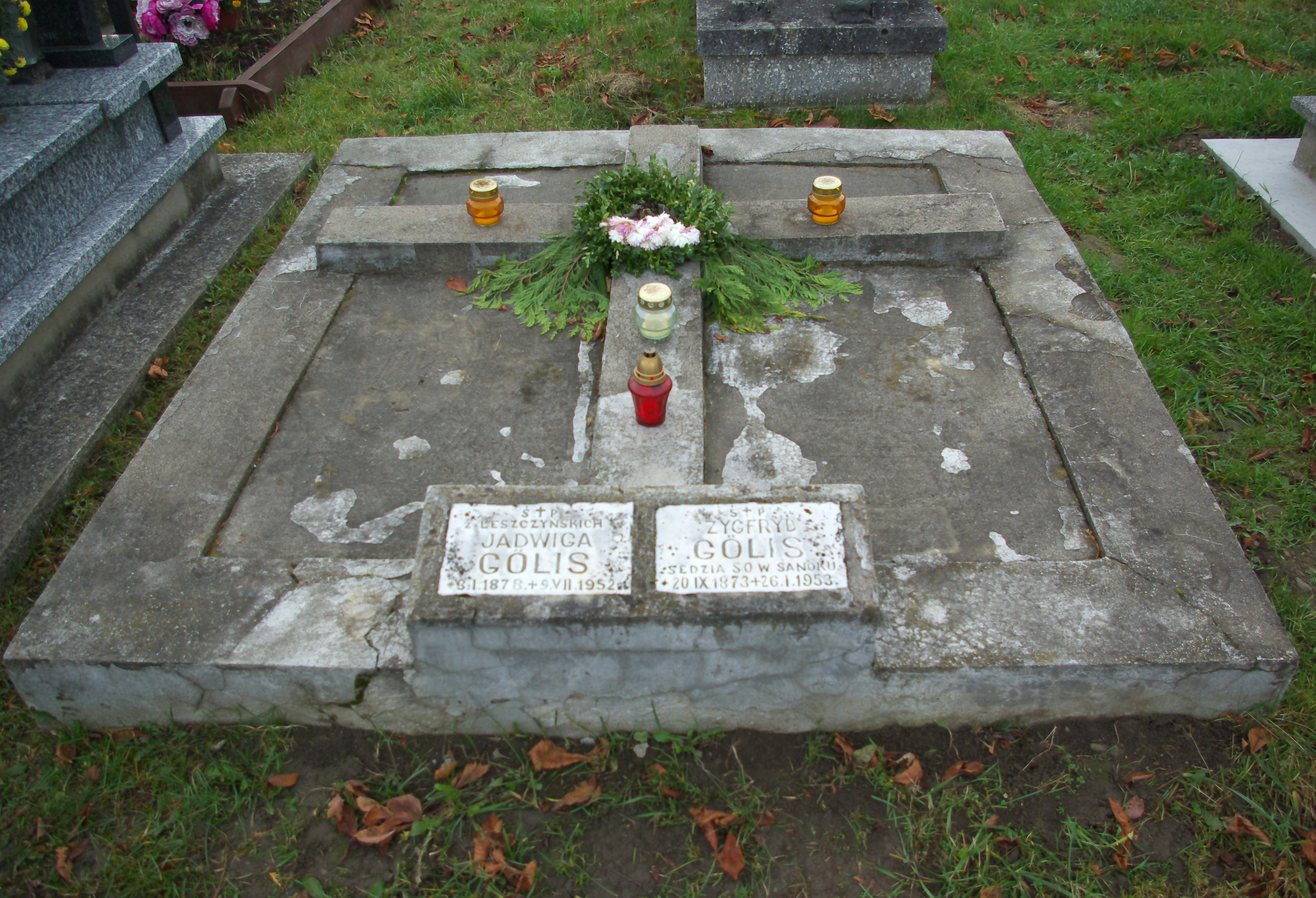 Nagrobek Jadwigi i Zygfryda Gölis na Cmentarzu Centralnym w Sanoku.